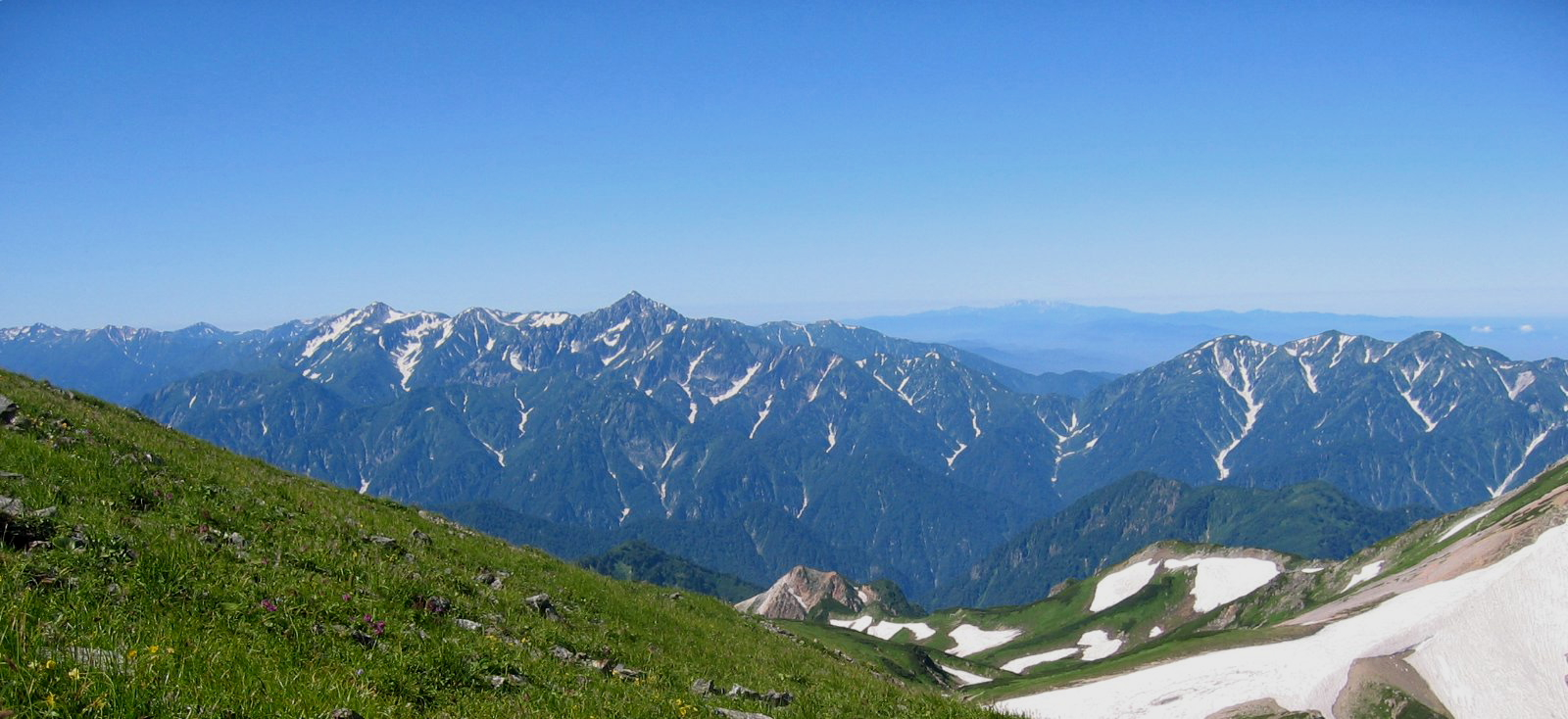 白馬岳から立山連峰 Canon IXY Digital 400